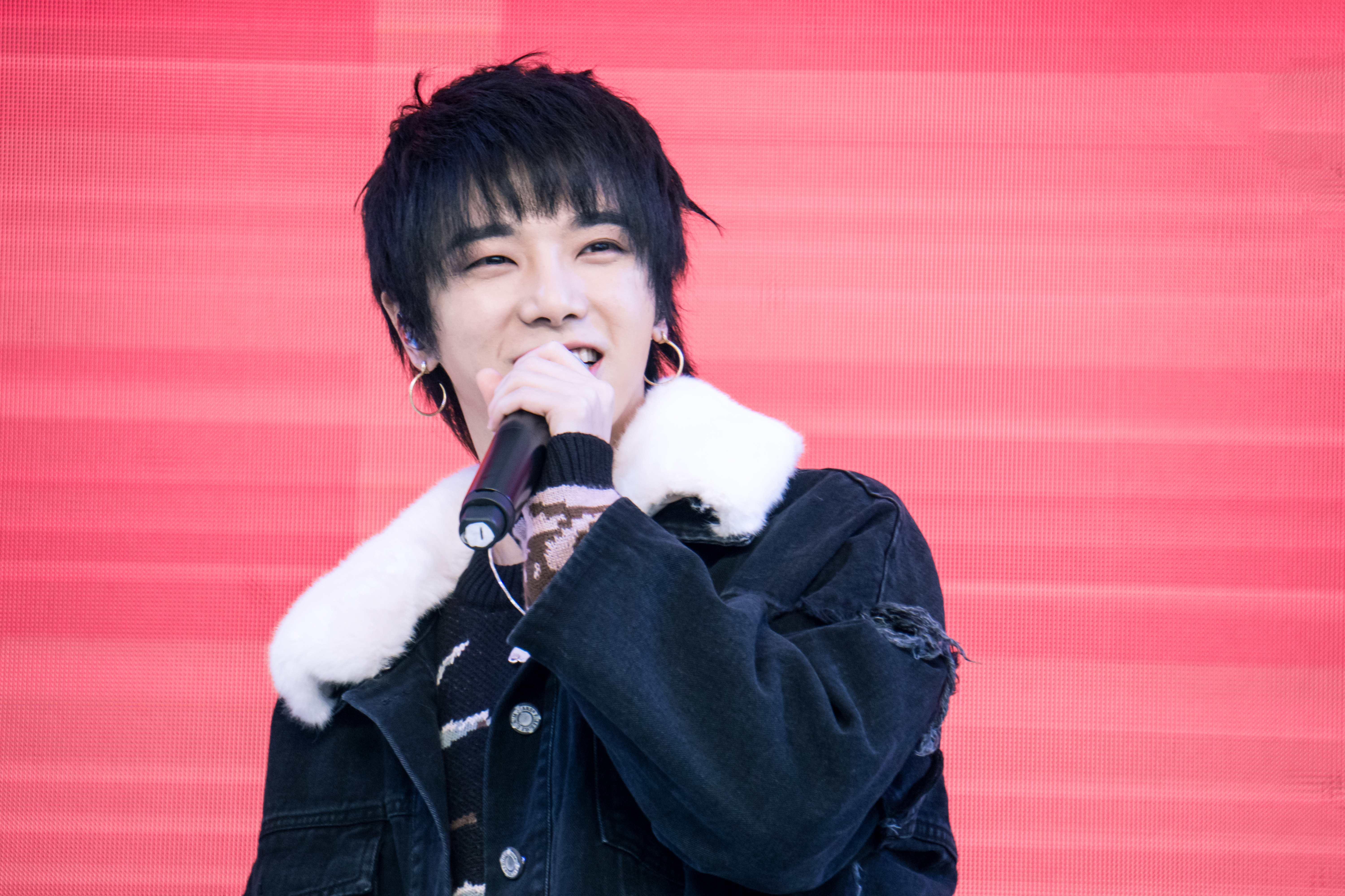 华晨宇苏州星悦荟 无水印高清精修第一波